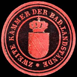 Sealing stamp Title: Zweite Kammer der Badischen Landstände Description: schwarz, rot, geprägt Place: Karlsruhe size: 2 cm